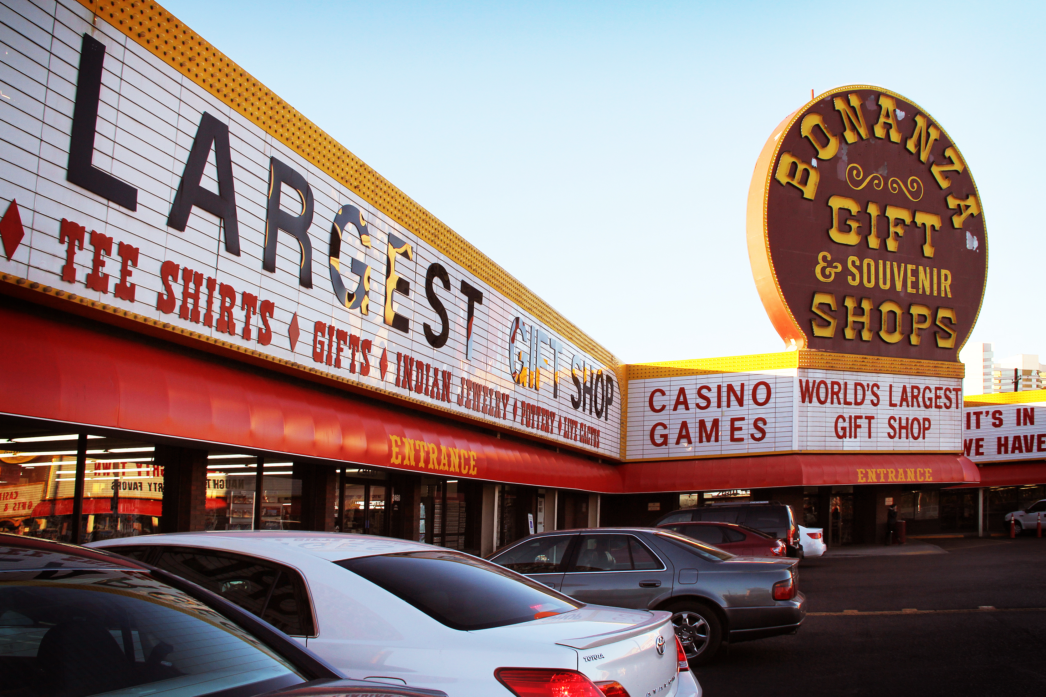 Bonanza Gift Shop, Las Vegas, NV